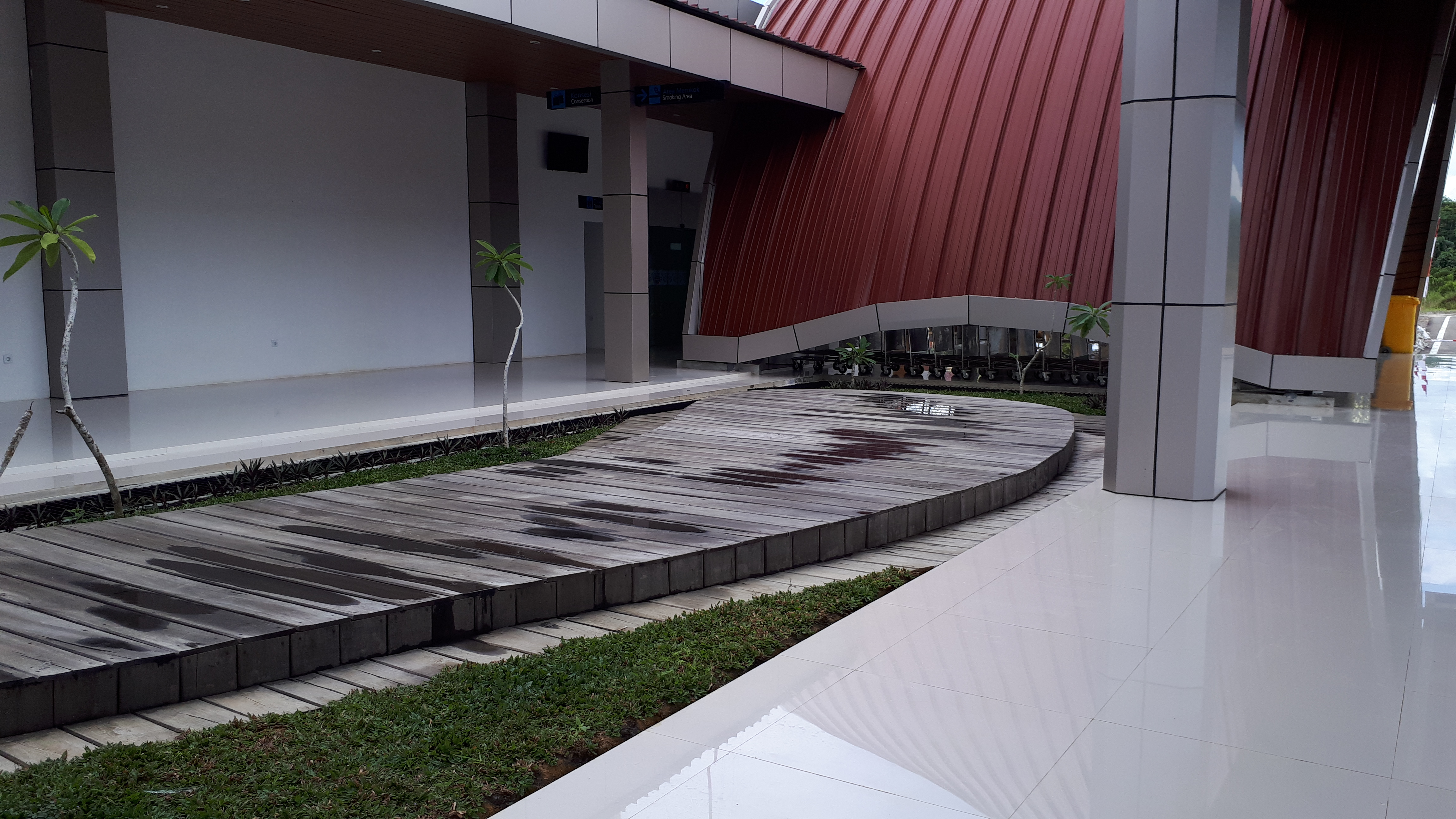 Smoking Area.